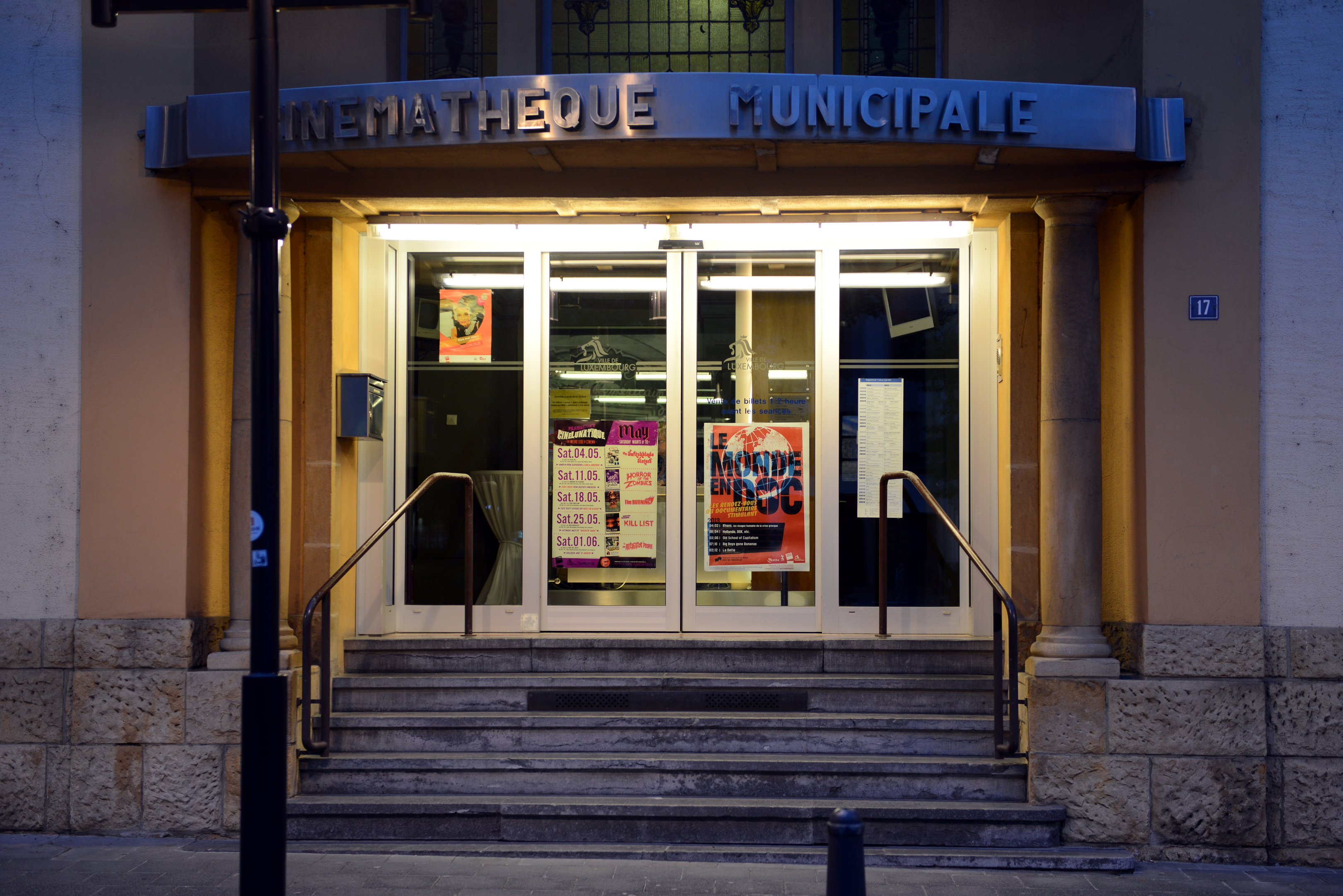 D'Entree vun der Stater Cinémathéik op der Theaterplaz.